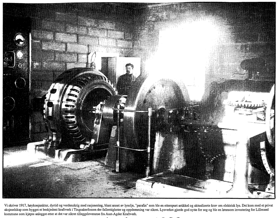 Lillesands første elektrisitetsverk. Bildet er fra nybygging i 1917